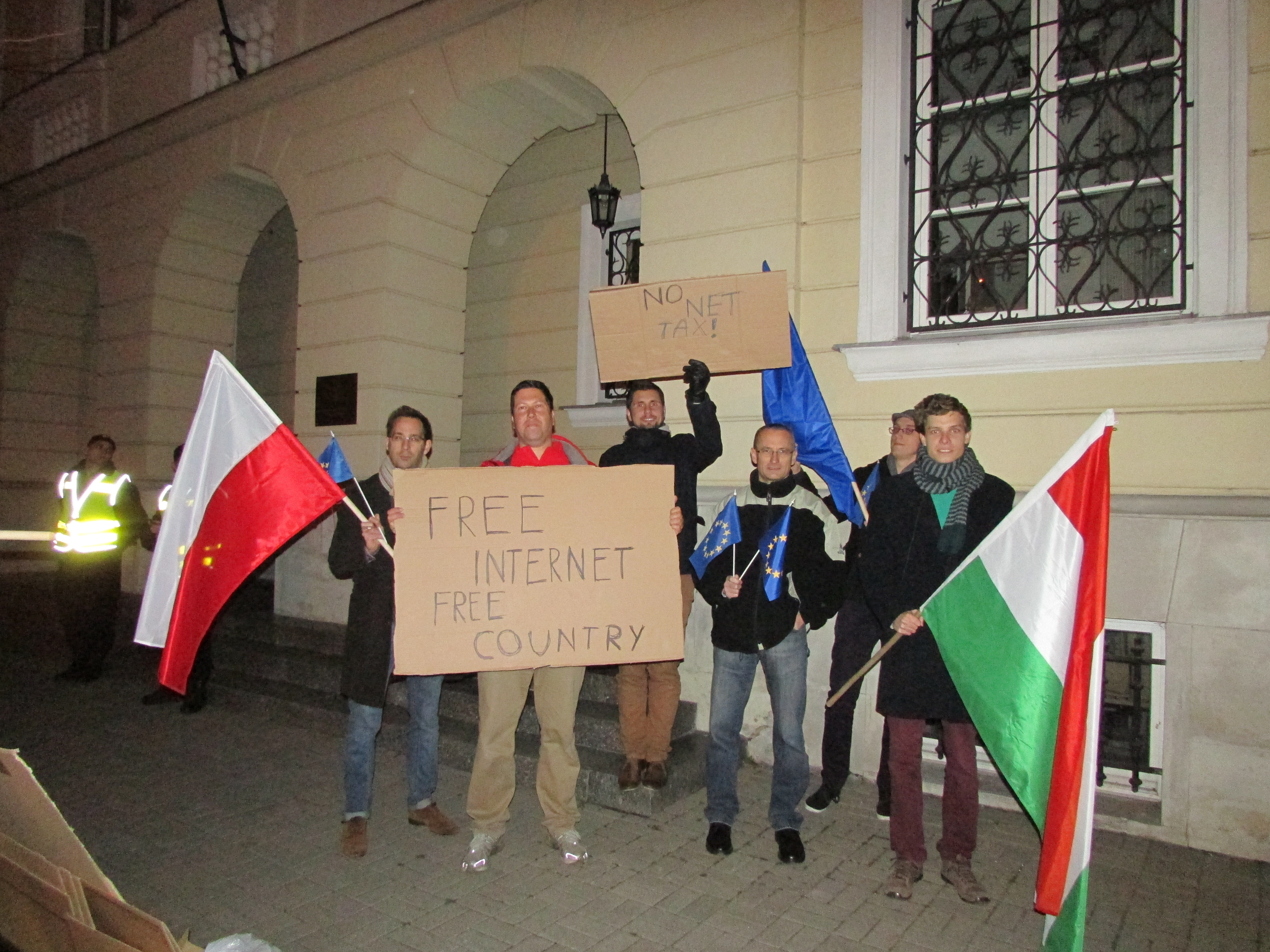 Warsaw